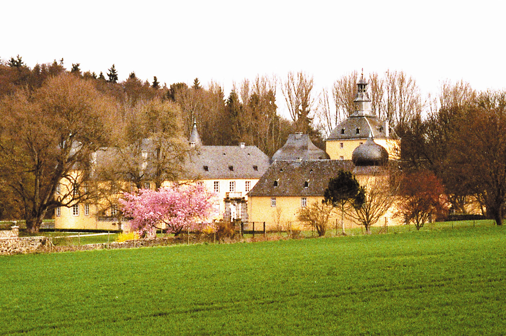 Außenaufnahme Burg Gudenau